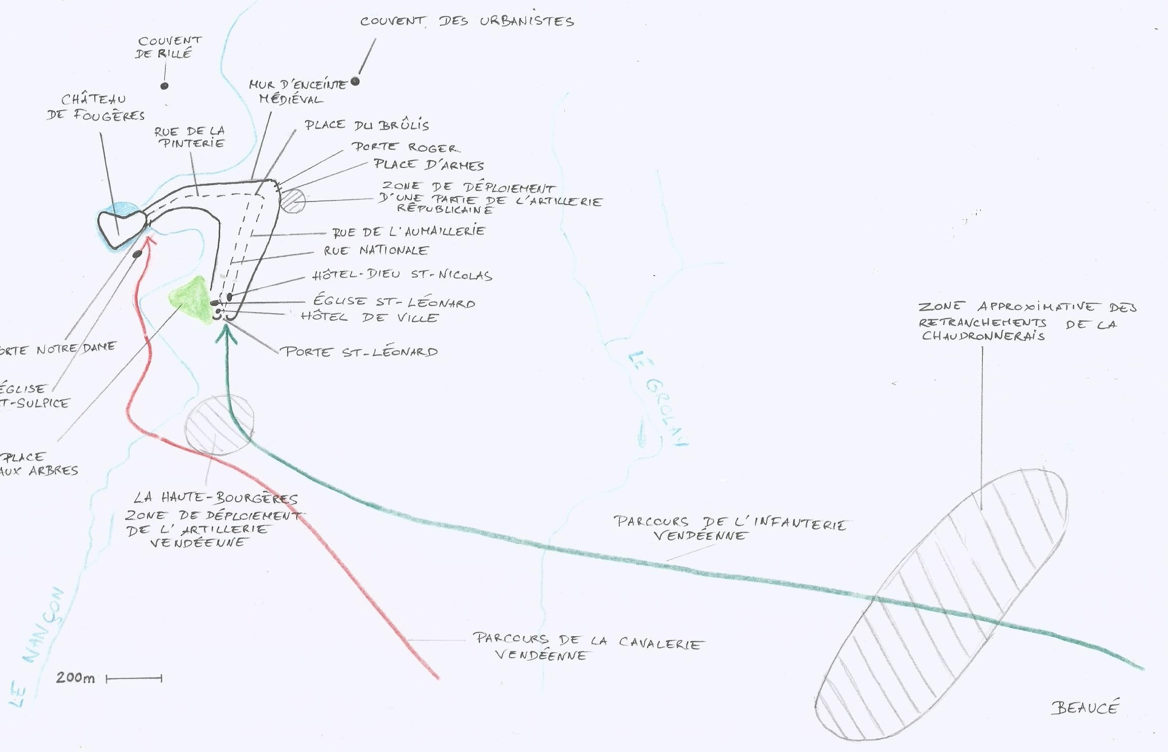 Carte de la bataille de Fougères, pendant la guerre de Vendée, le 3 novembre 1793.